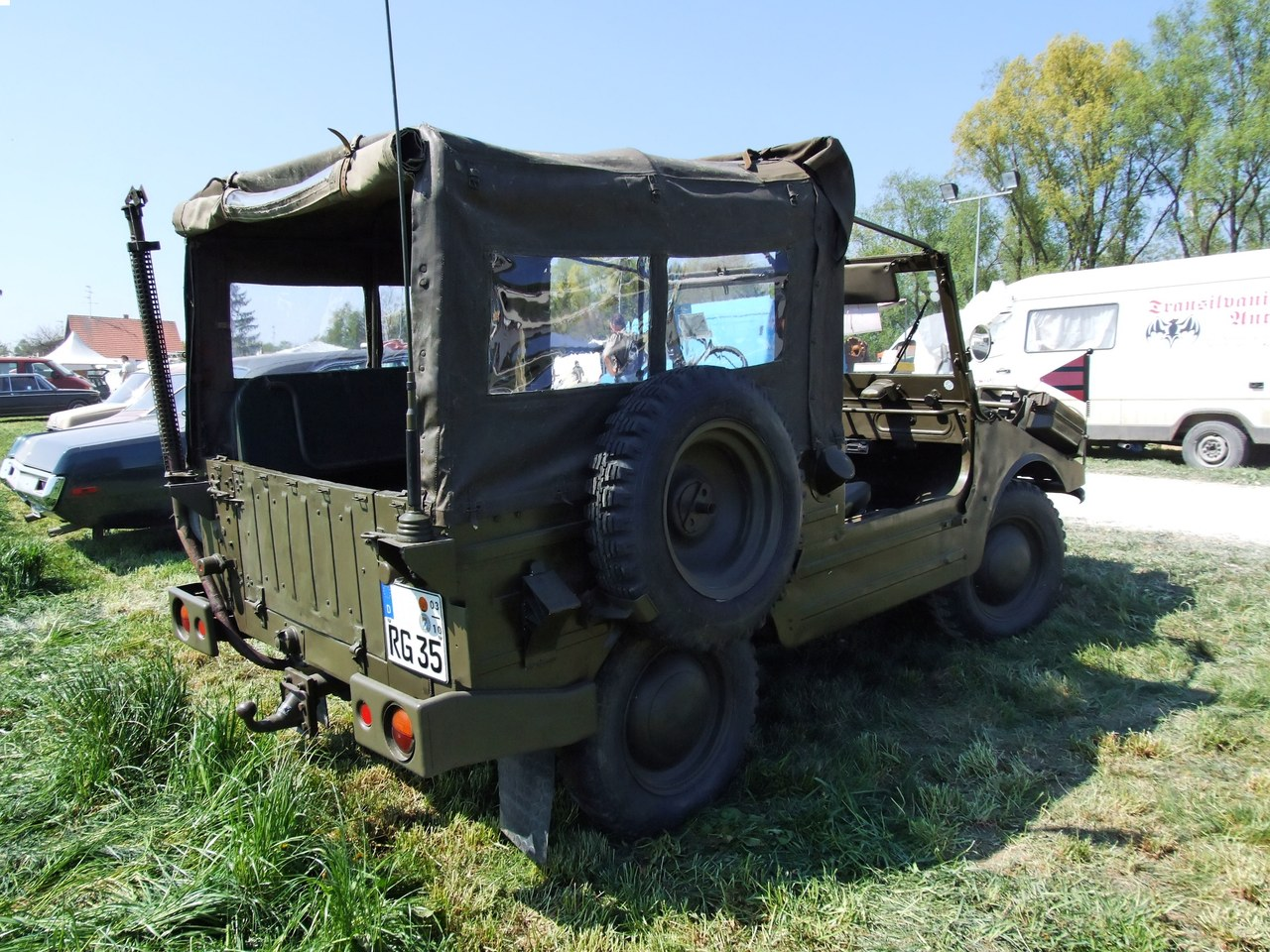 Quelle: selbst fotografiert, 04/2007 Fotograf: Späth Chr.